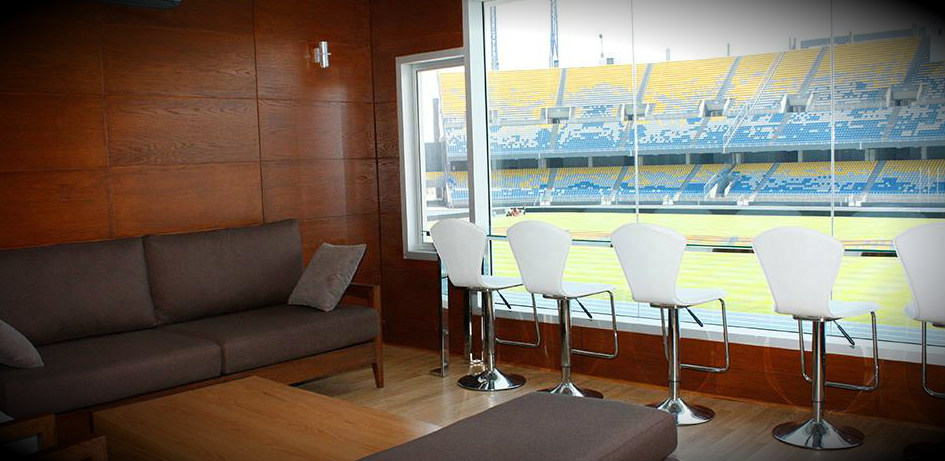 Loge vip Stadio di Marrakech